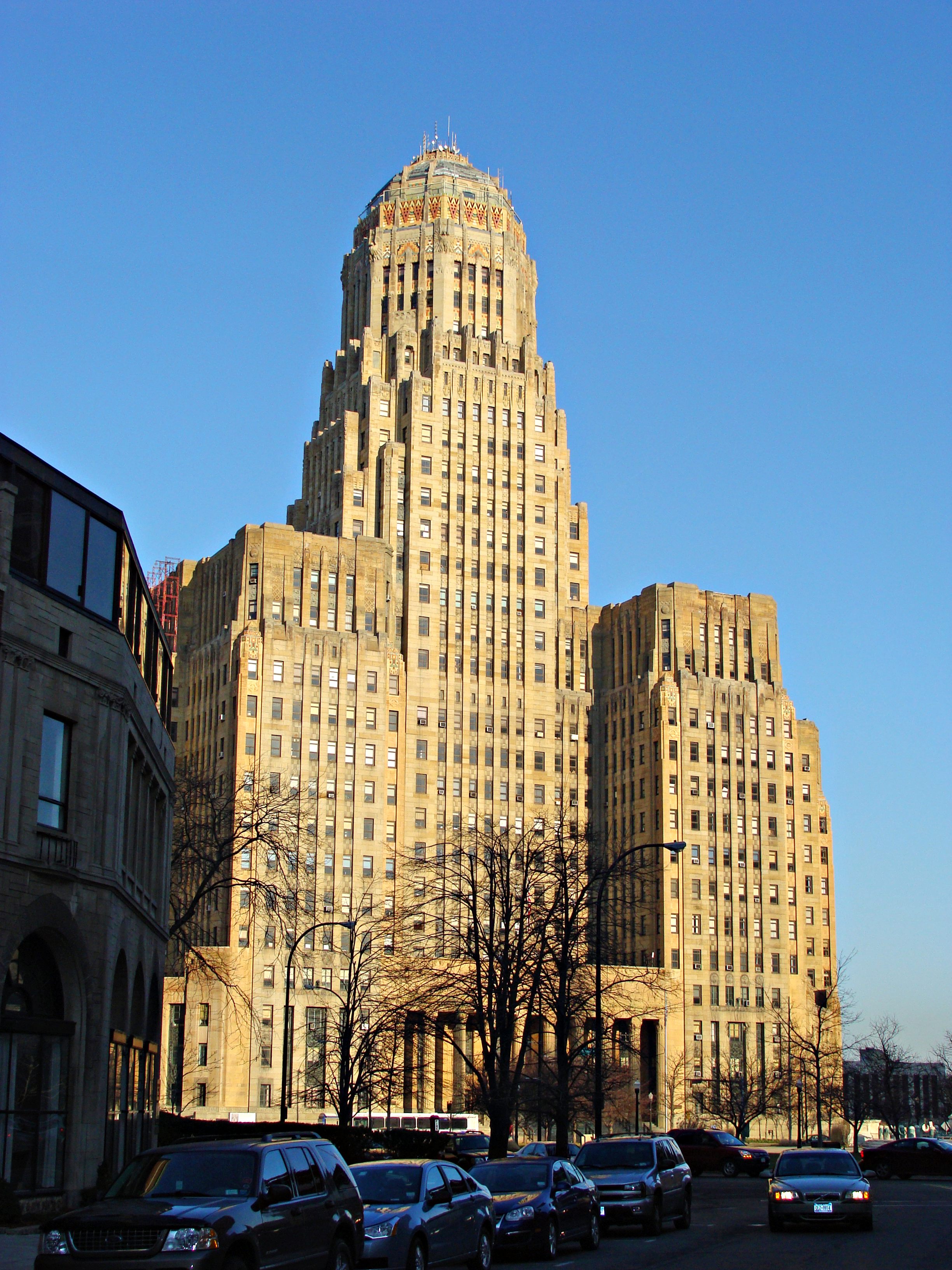 Vereinigte Staaten: Buffalo City Hall